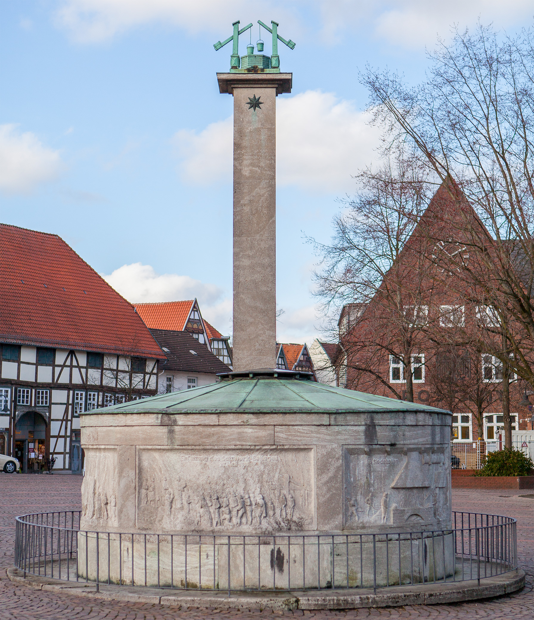 Paulinenquelle auf dem Salzhof in Bad Salzuflen (Ansicht von Süden) This is a photograph of an architectural monument.